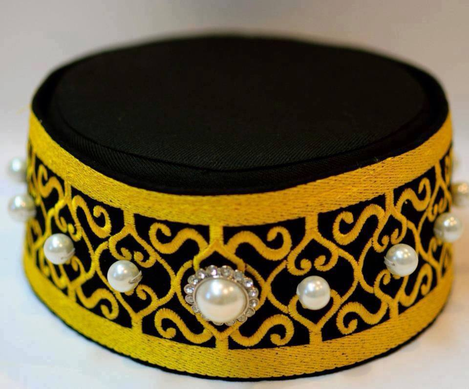 Datu Sadja ametlik peakate (Royal Sultanate of Sulu)